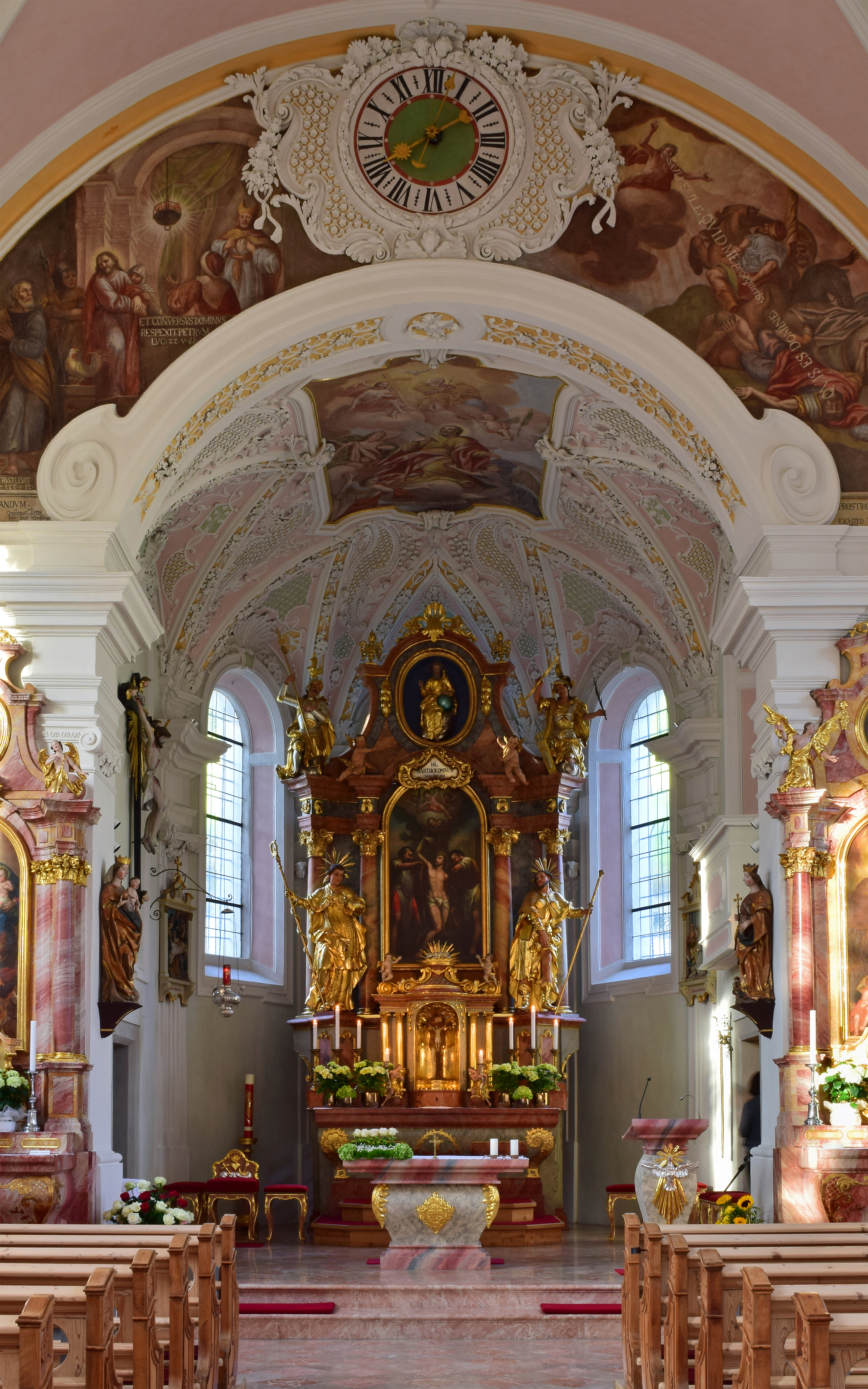 Kath. Pfarrkirche hl. Bartholomäus